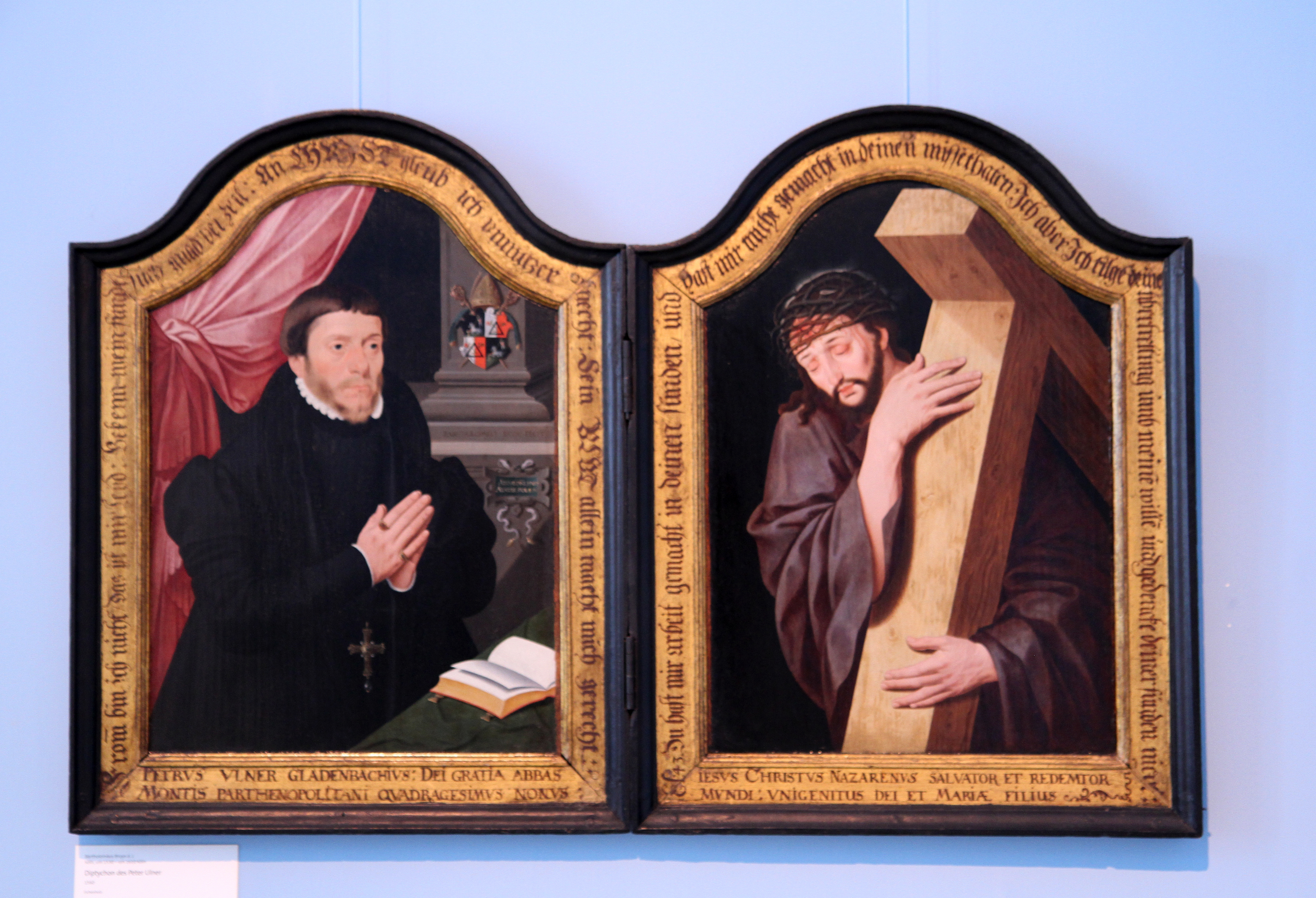 Der betende Peter Ulner (1560) als Halbfigur an der linken Seite eines Adorationsdiptychons des jungen Bartholomäus Bruyn. Die rechte Tafel zeigt den das Kreuz tragenden Christus auf seinem Leidensweg. Signatur: BARTHOLOMEO BRVN FECIT (einzig signiertes Werk des Künstlers.)